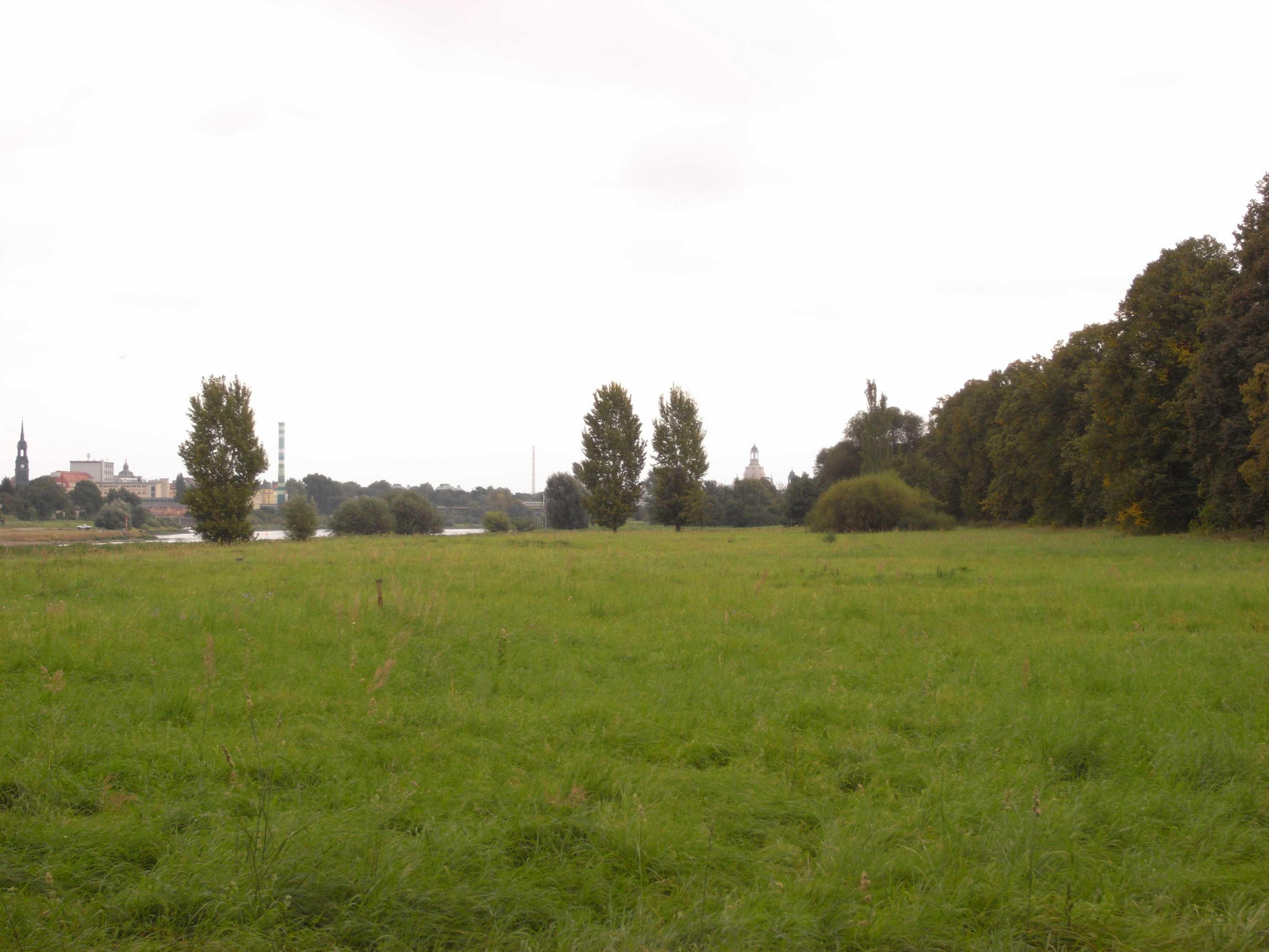 Großes Ostragehege, Elbwiesen (Dresden, Sachsen, Deutschland)